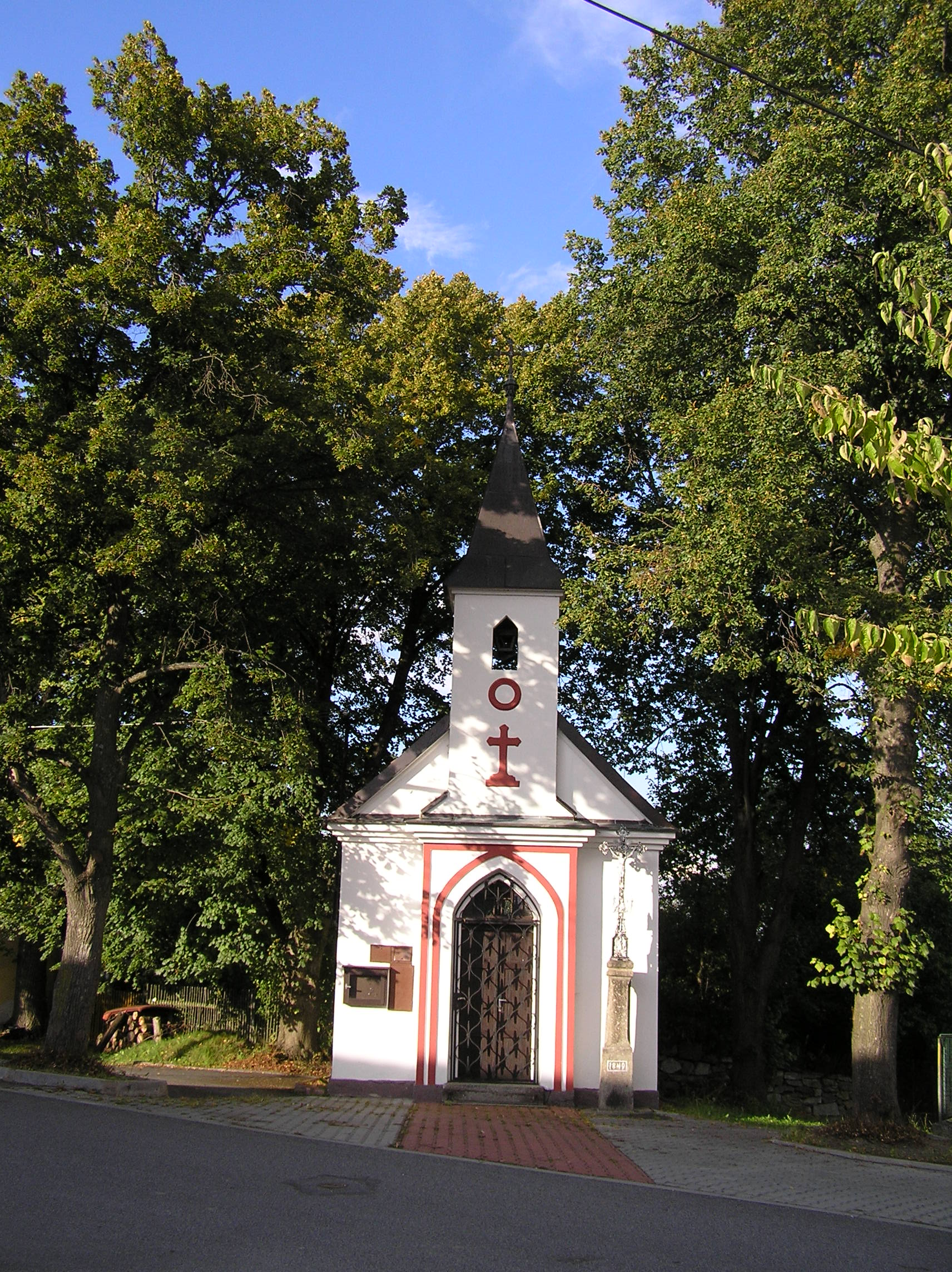 Kaplička ve Vacovicích